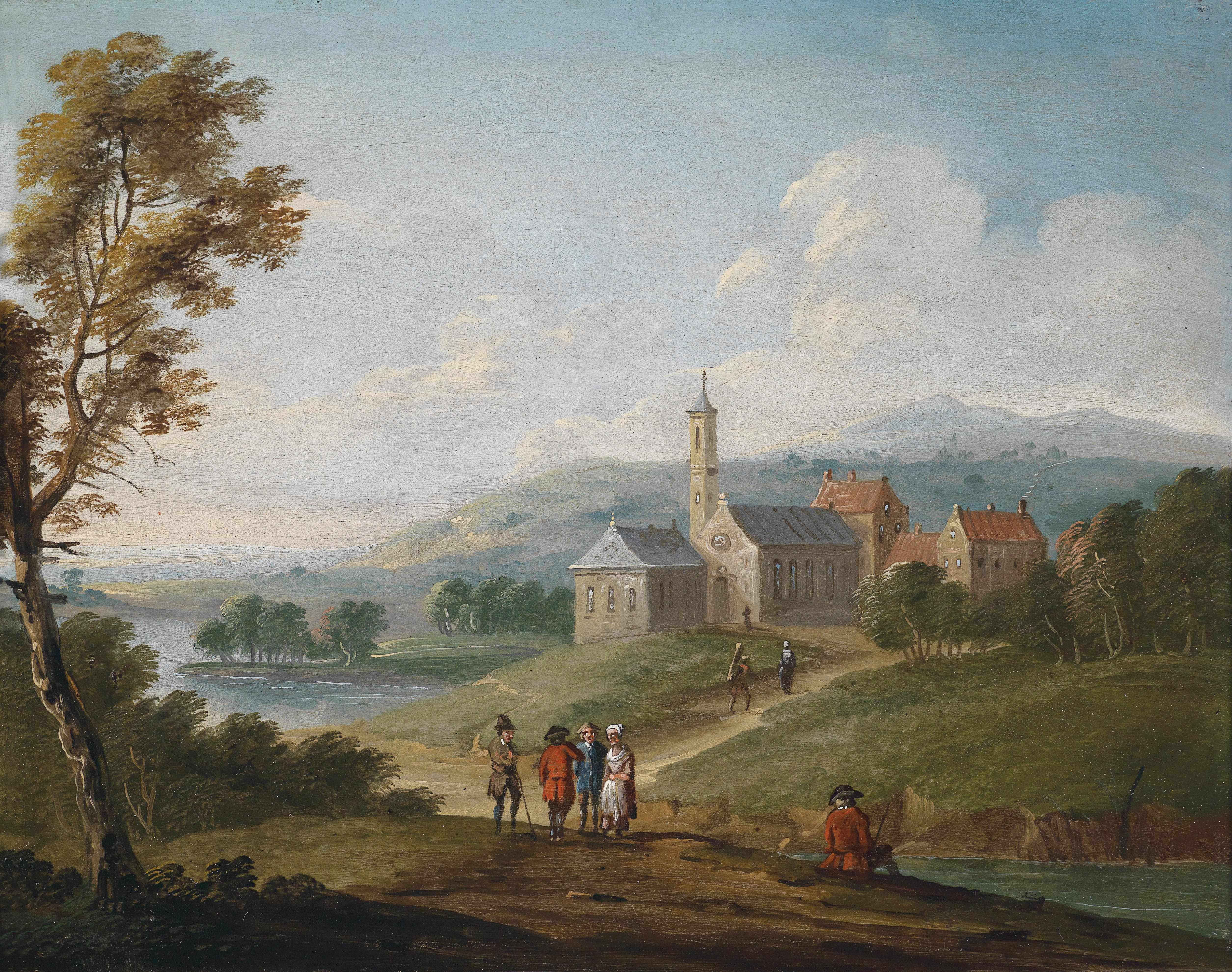 Flusslandschaft mit einem Dorf und Wanderern